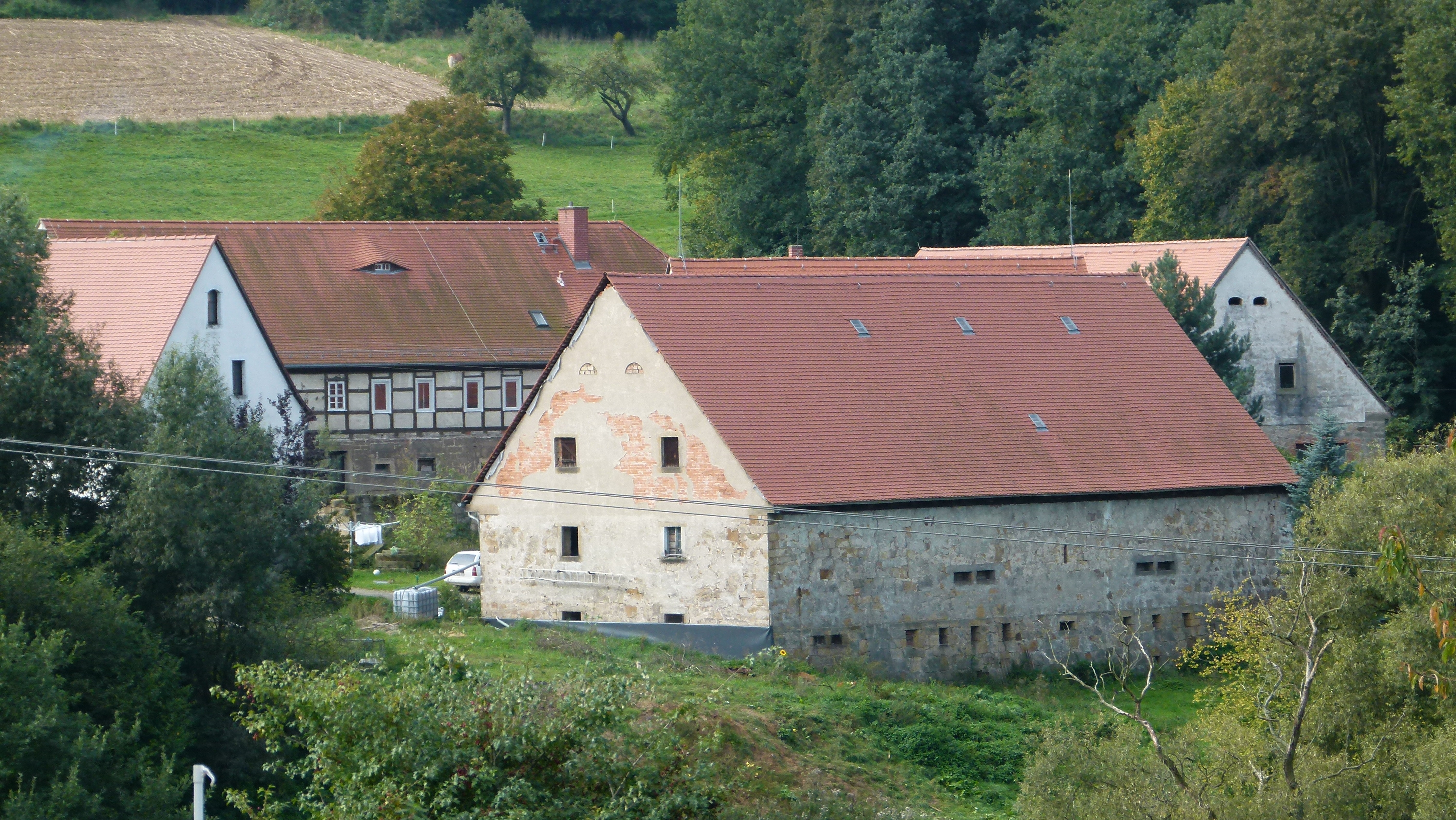 Denkmalgeschützte Bauerngehöfte, Vorwerkstraße, Ortsteil Dorf Wehlen, Stadt Wehlen, Sachsen